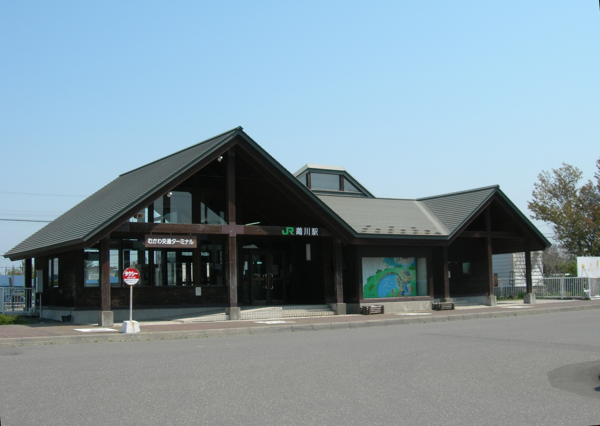 Mukawa Station in Hidaka Main Line, Japan